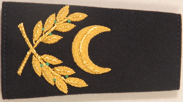 insigne d'épaule de l'aumônerie musulmane de l'armée française